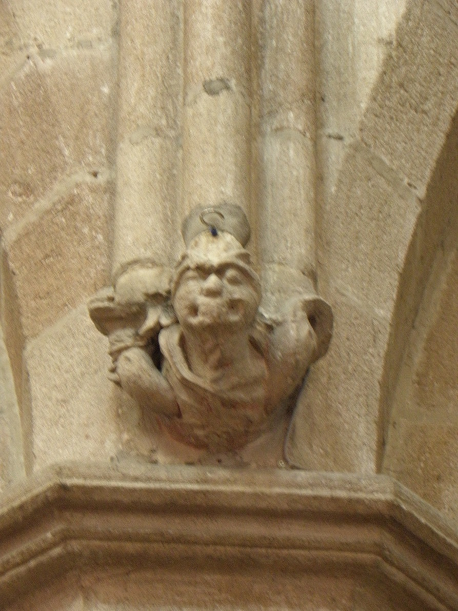 Culot sculpté de la nef de la cathédrale Saint-Tugdual de Tréguier (22). .